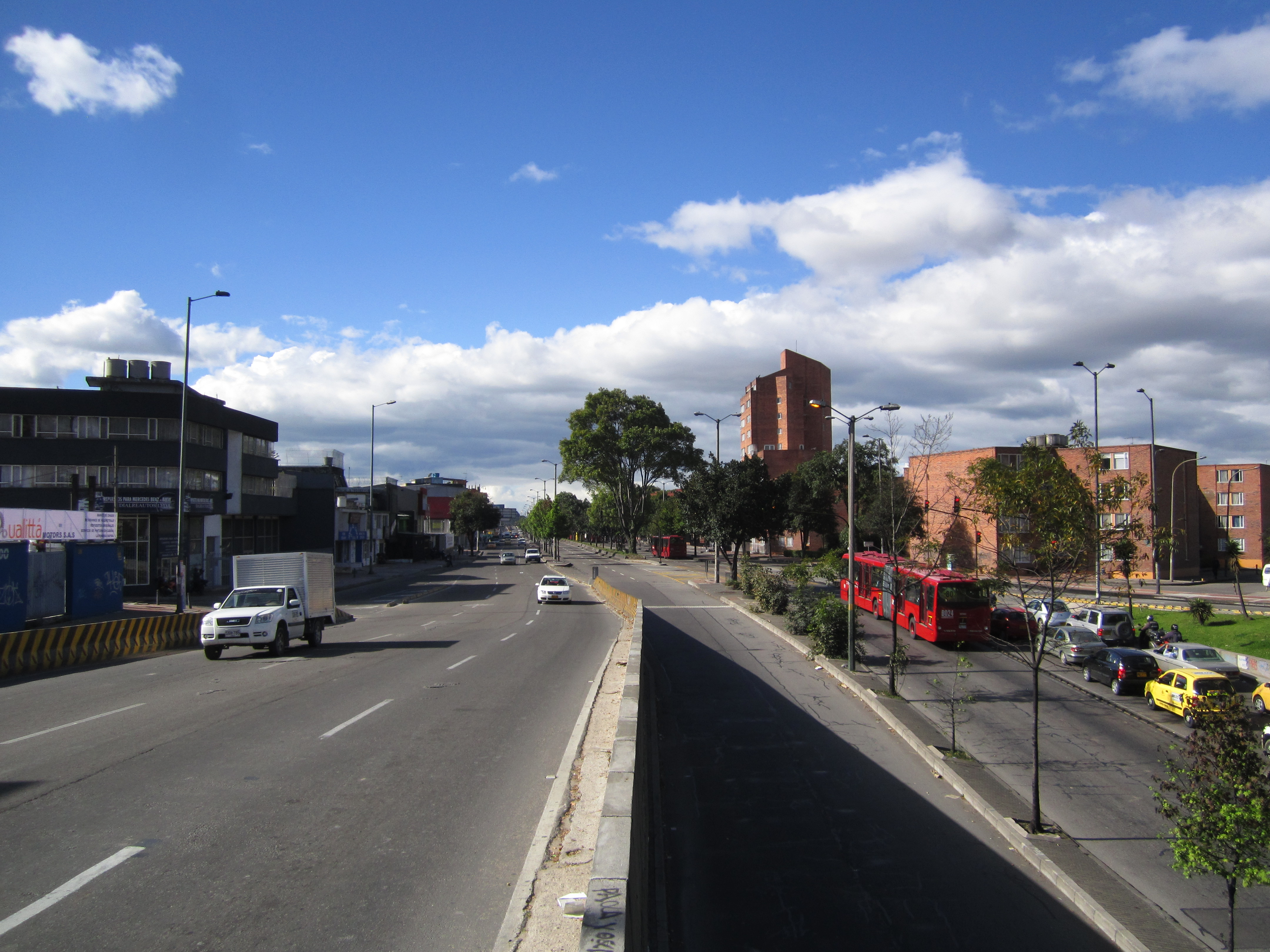 Bogota calle 80 con Autopista Norte